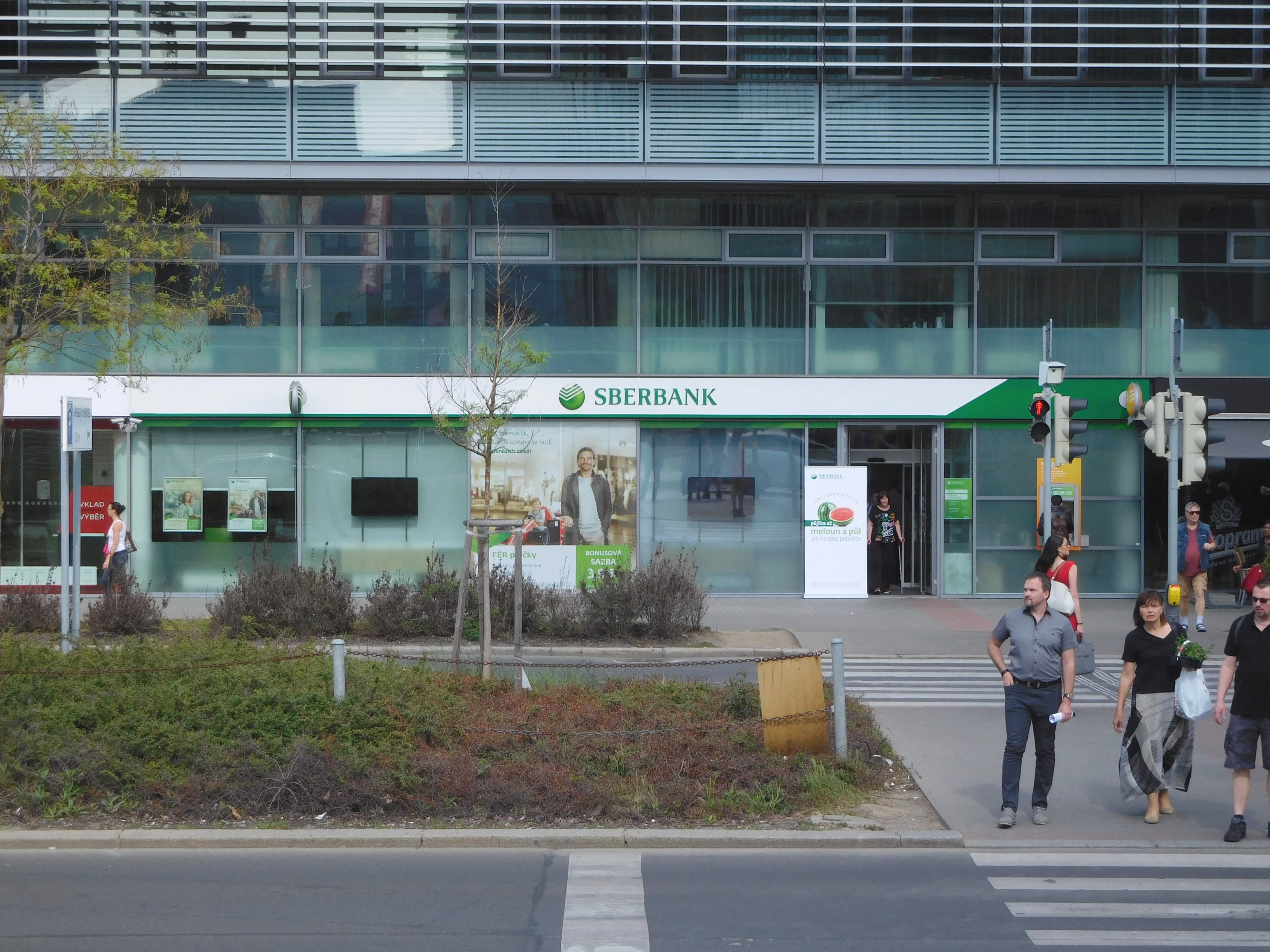 Praha - Pankrác, Na Pankráci 129, Sberbank